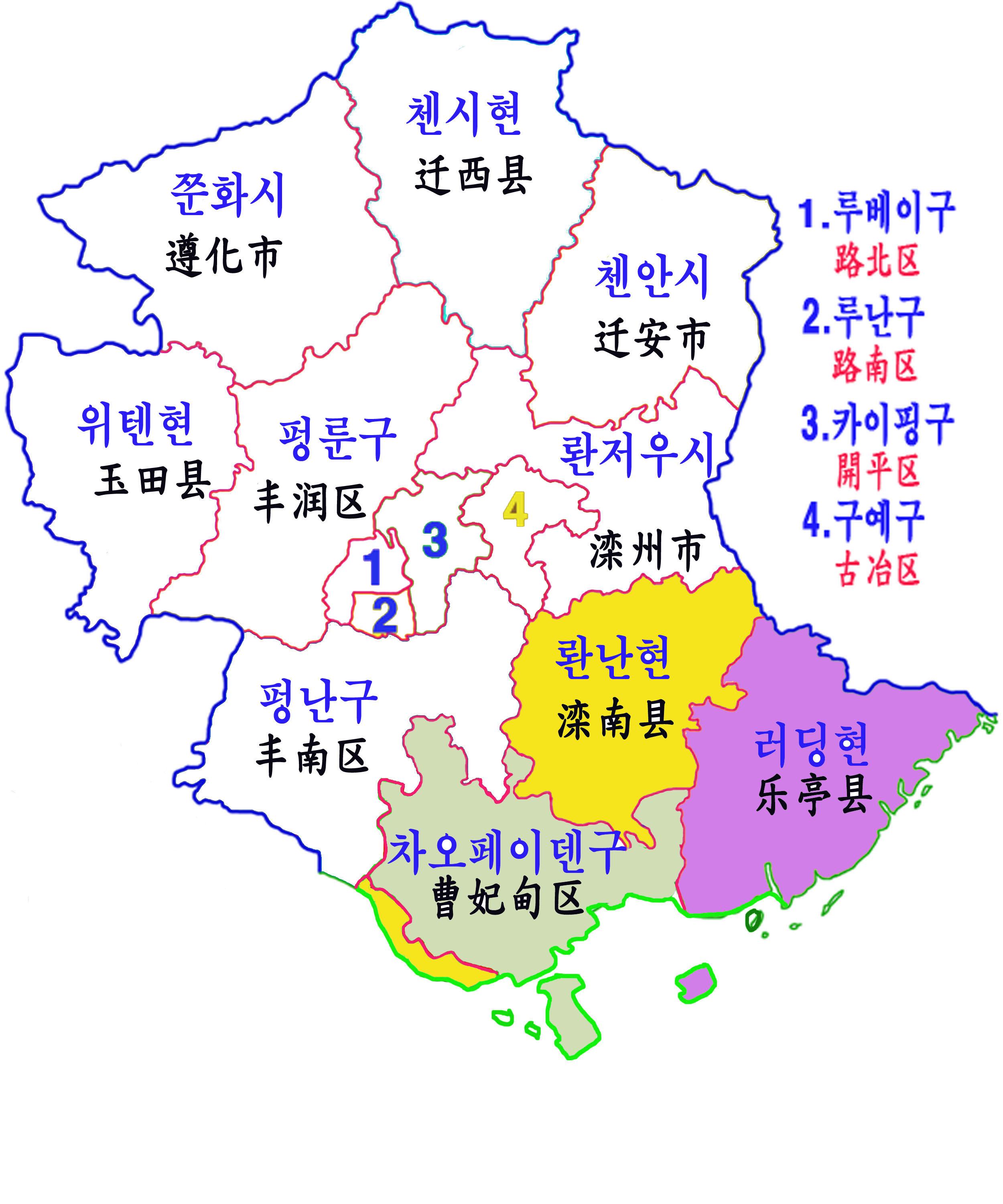 탕산시 행정구역